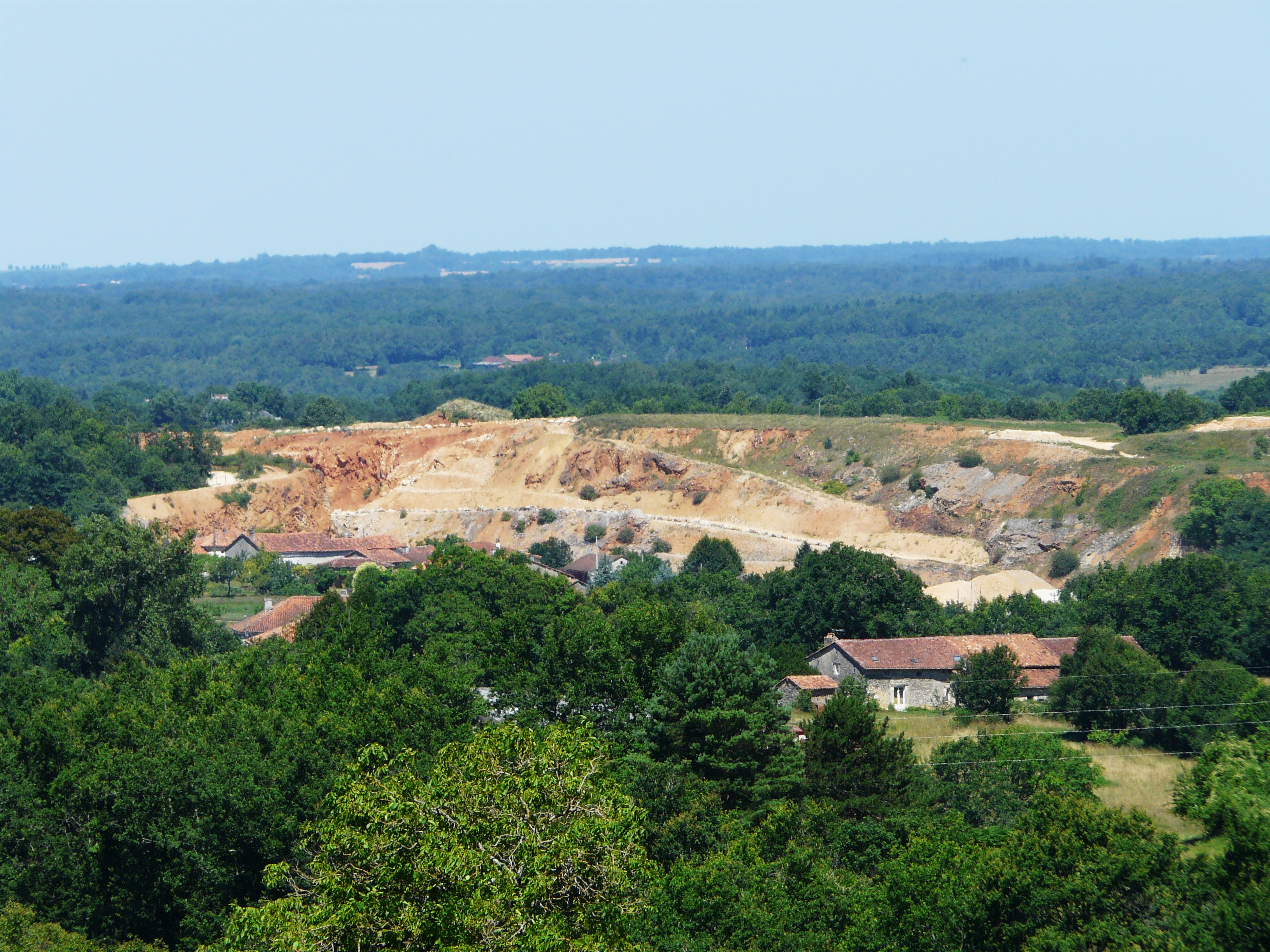 La carrière de calcaire de Sabouret, Saint-Martial-de-Valette, Dordogne, France.